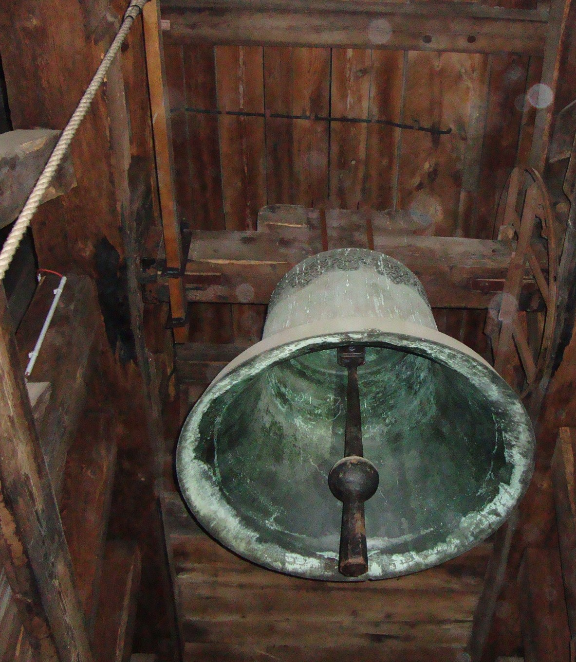 Frauenglocke im Regensburger Dom